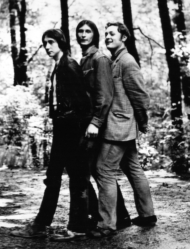 Jazz Half Sextet 1971